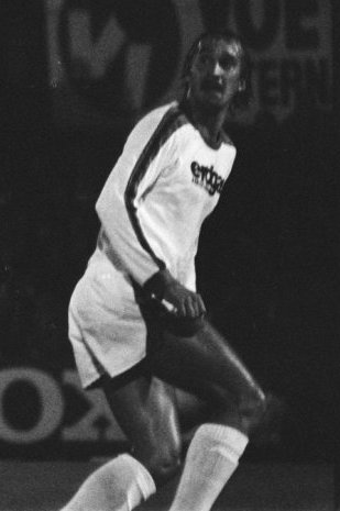 Uli Stielike met Borussia Mönchengladbach op het Amsterdam 700 Tournament tegen Ajax